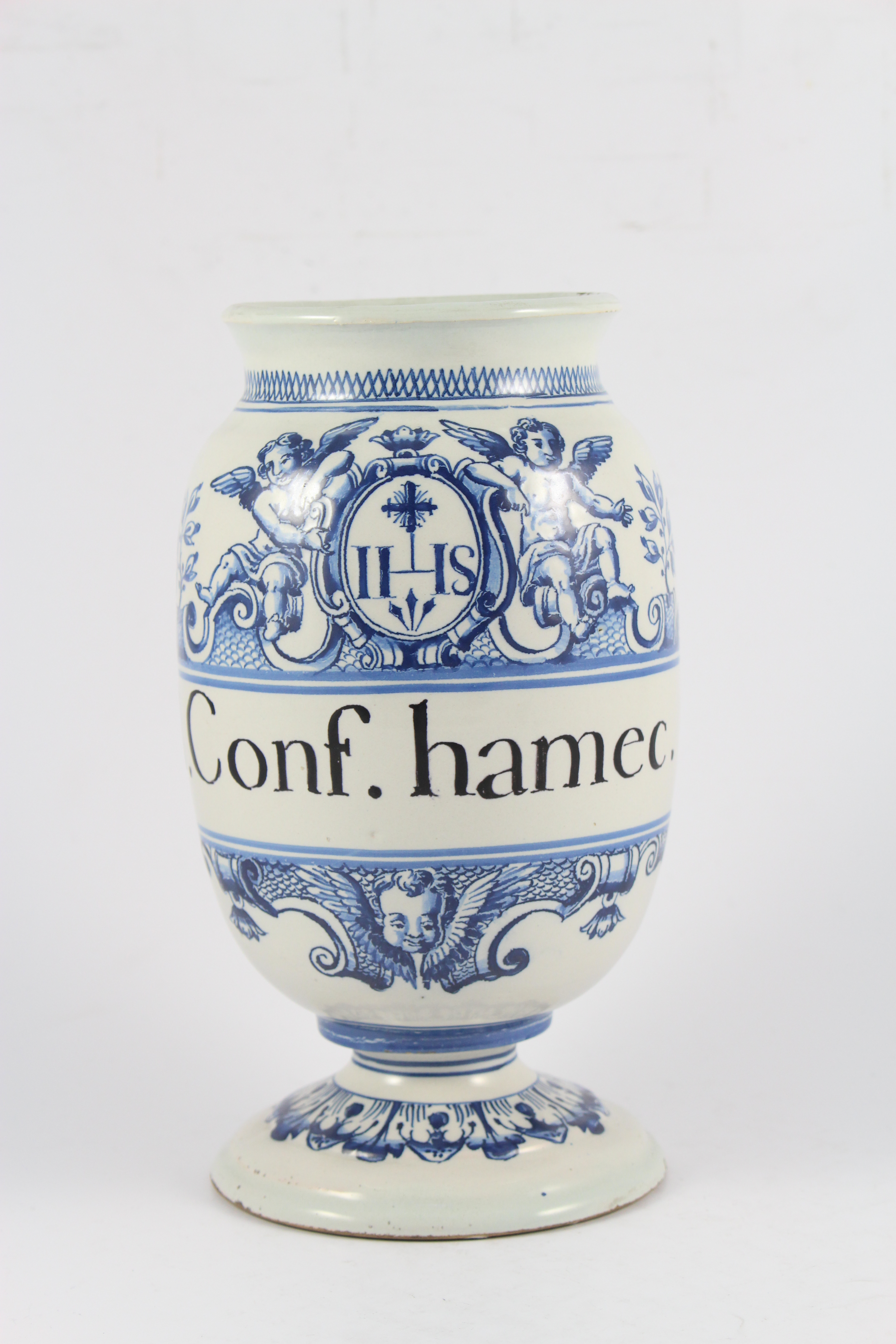 Confection Haemech - pot canon